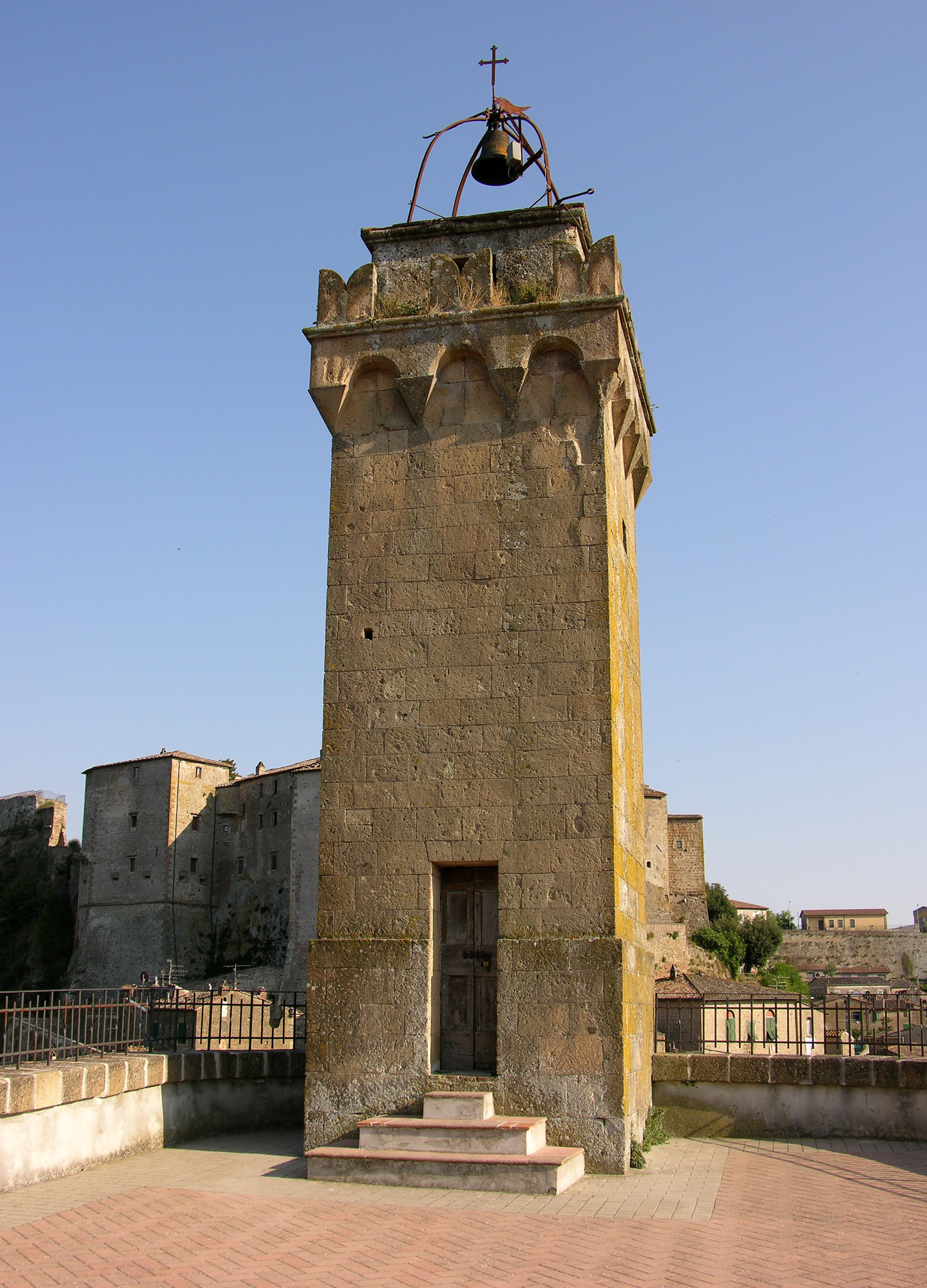 Sorano (GR) - Lato posteriore della Torre dell' Orologio sul Masso Leopoldino.